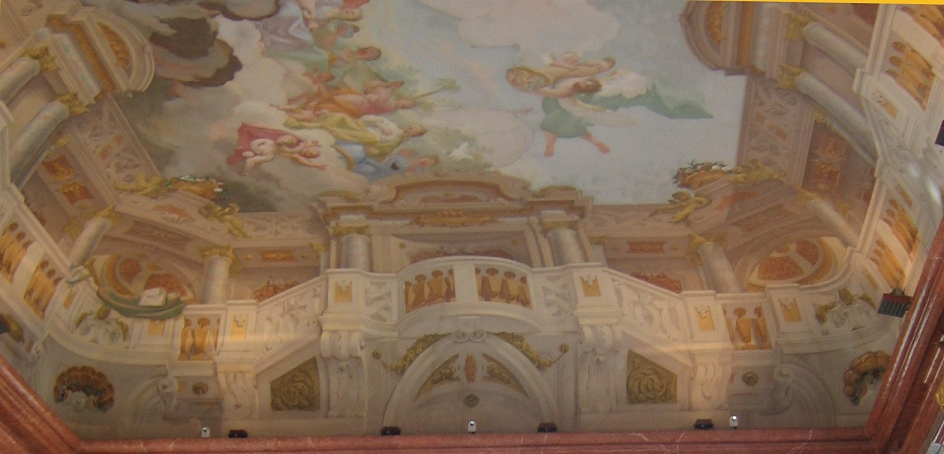 Scheinarchitektur